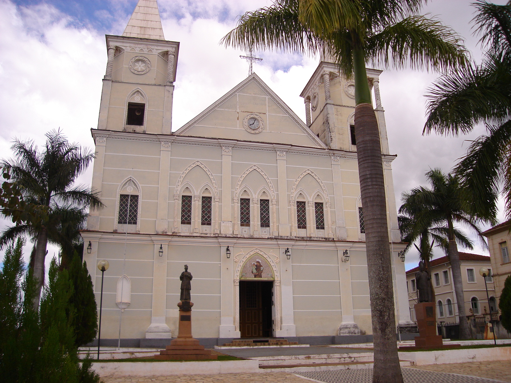 Catedral de Santo Antônio (1787), Campanha - MG